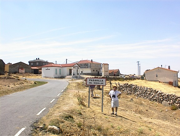 Pasarilla del Rebollar